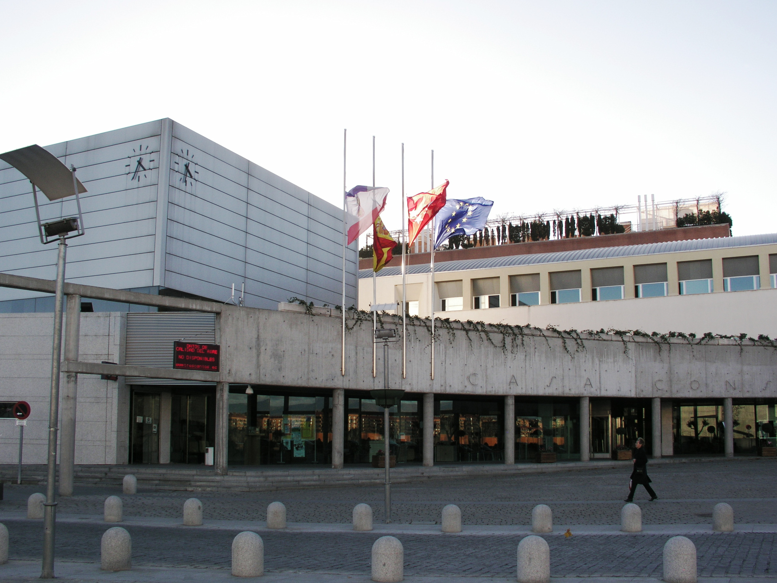 Tres Cantos, Madrid, Spain. Casa Consistorial.